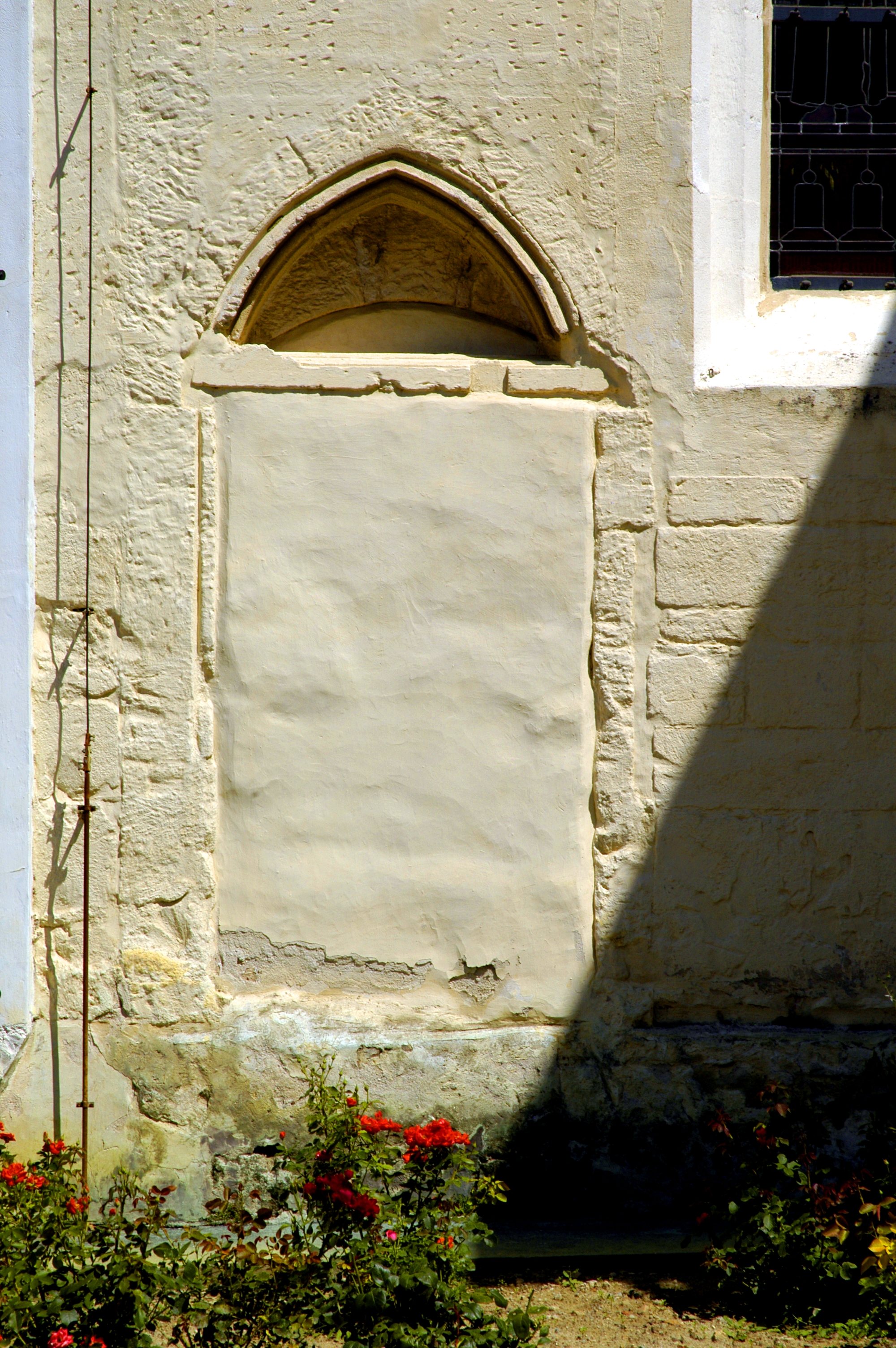 katholische Pfarrkirche heiliger Martin, vermauertes Portal an der Südfassade